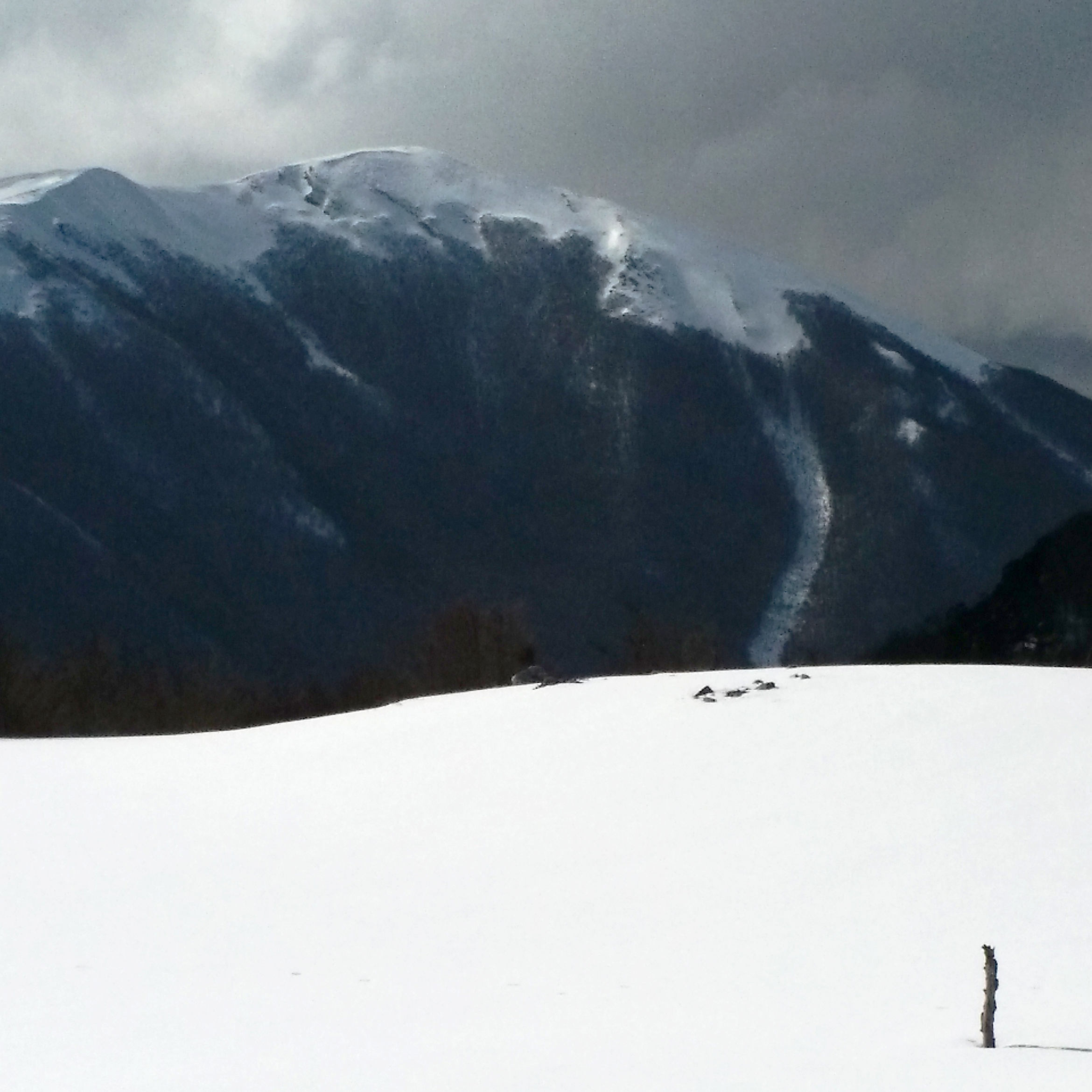 Immagine della valanga ricoperta di neve (sulla destra).